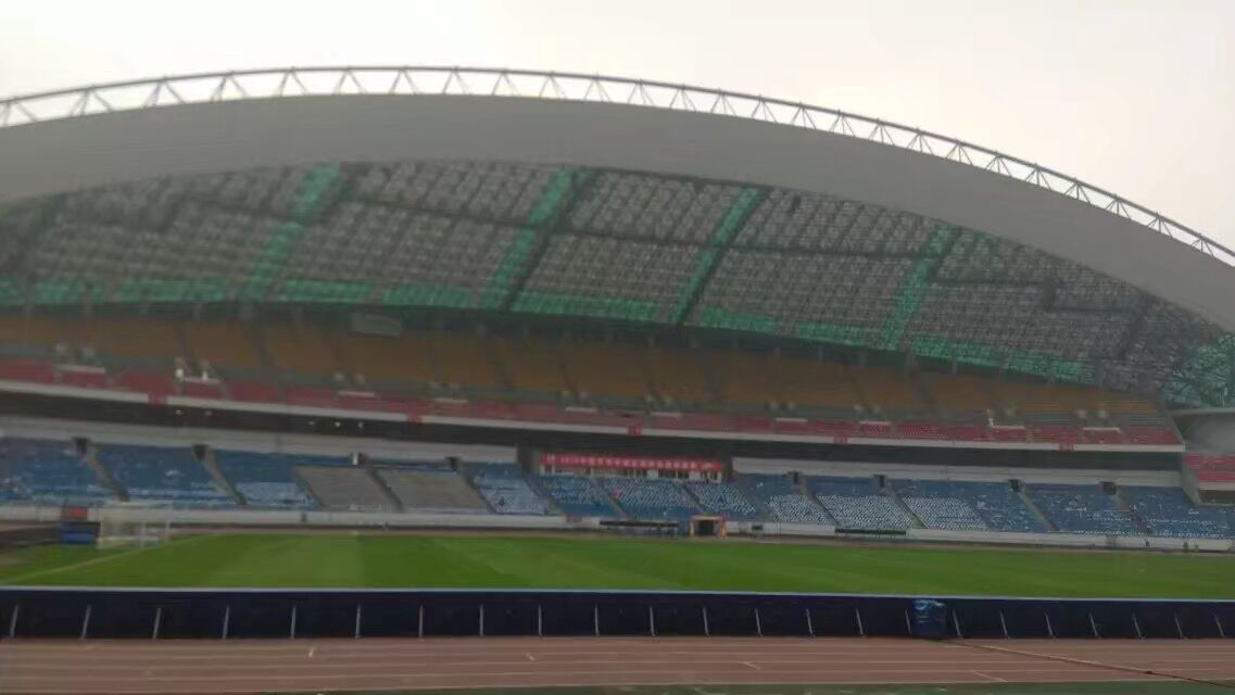 Chongqing Olympic Stadium 重庆奥体中心